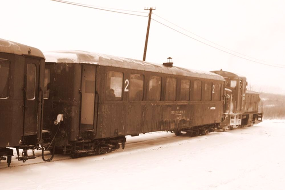 A Bodrogozi Gazdasági Vasút az 1970-es években.